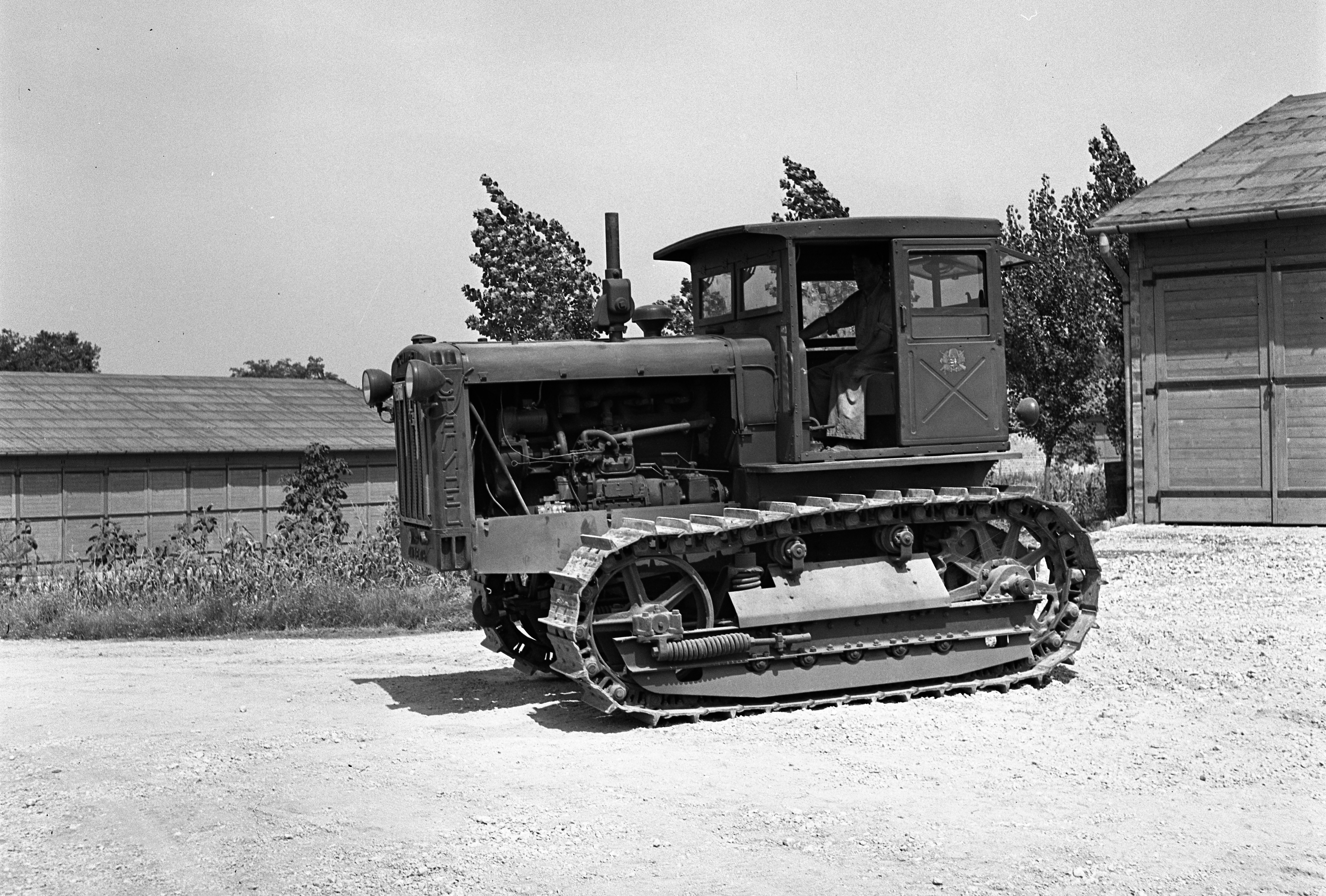 Mátyásföld, Újszász utca 41-43. Magyar Királyi Honvéd gépkocsiszertár, szovjet gyártmányú S-65 Sztalinyec traktor. Location: Hungary, Budapest XVI. Tags: Soviet brand, tractor, track, Stalinec-brand, military, Budapest Title: Mátyásföld, Újszász utca 41-43. Magyar Királyi Honvéd gépkocsiszertár, szovjet gyártmányú S-65 Sztalinyec traktor.